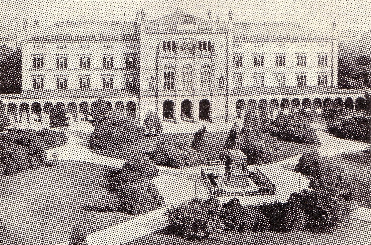 Fotograie der 1862 eingeweihten neuen Albertus-Universität Königsberg mit den alten Parkanlagen und dem Reiterstandbild von König Friedrich Wilhelm III.